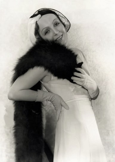 Gita Parlo